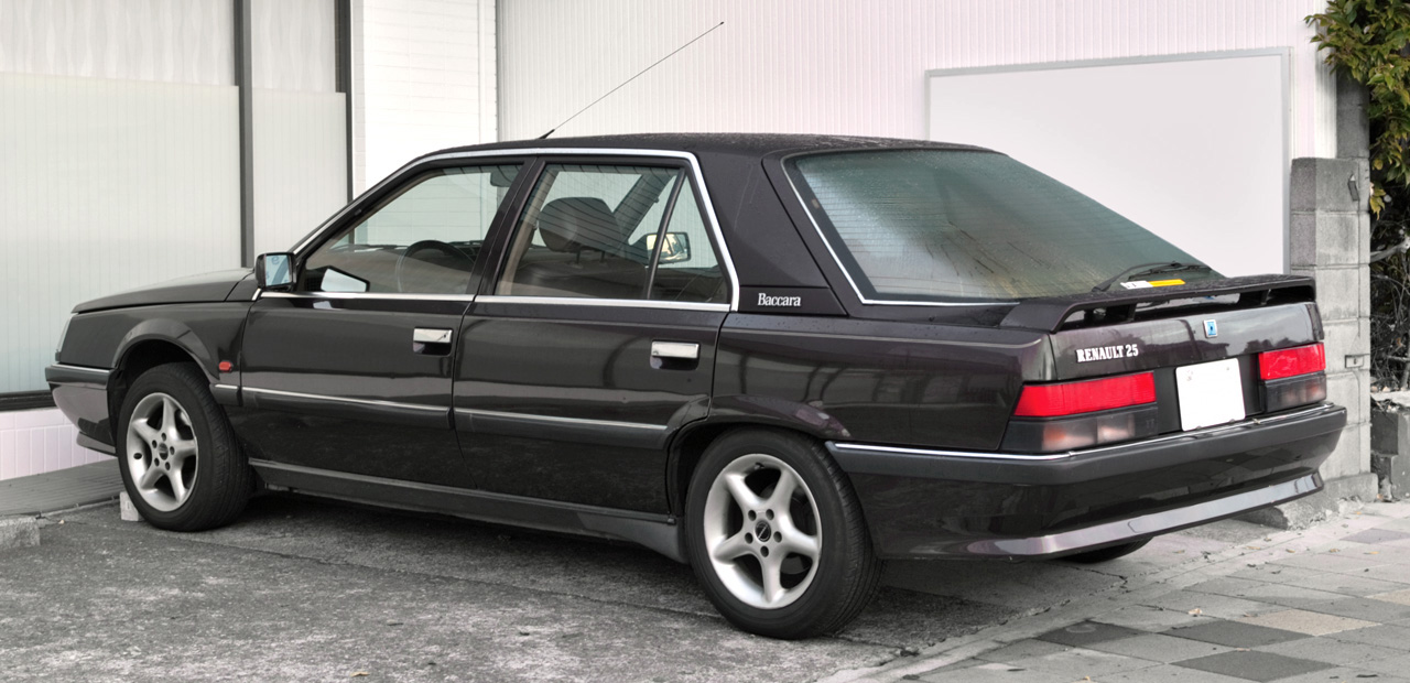 Renault 25 Phase II Baccara